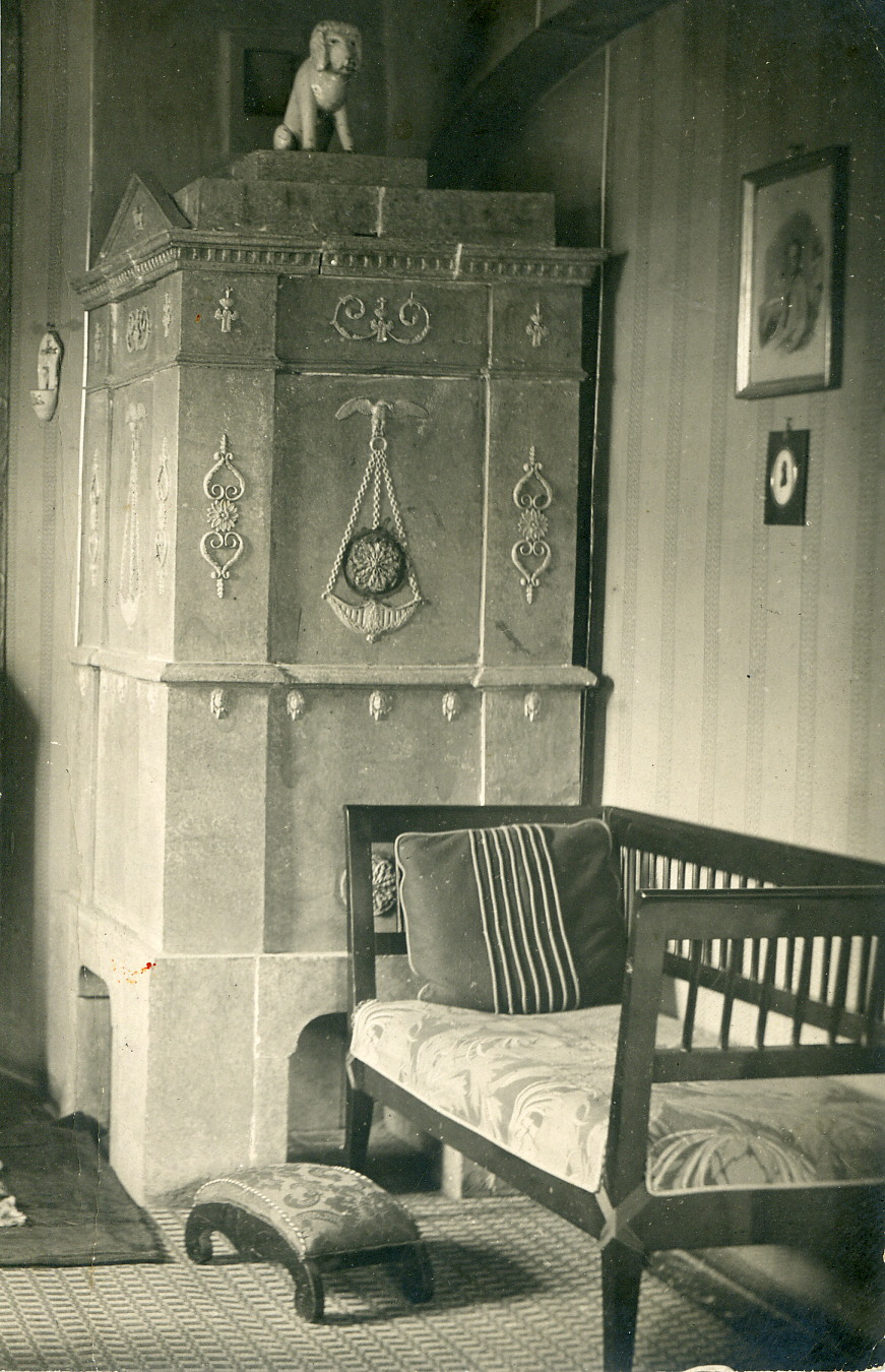 Hoeckerhaus-Kachelofen